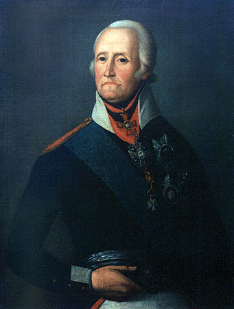 Розенберг Андрей Григорьевич (1739-1813)— генерал от инфантерии; Смоленский военный губернатор, участник Итальянского похода